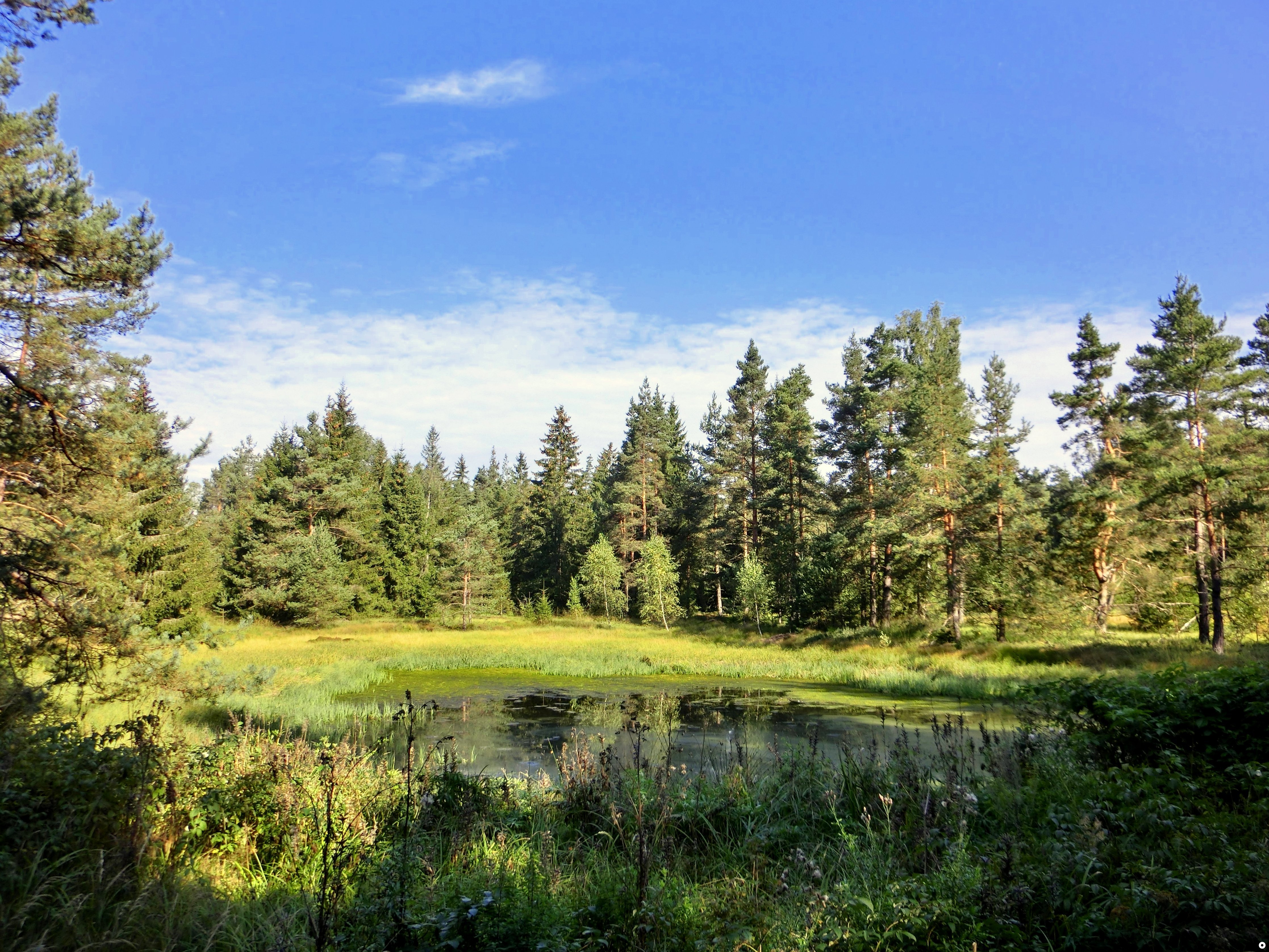 NSG Hahnenfilz